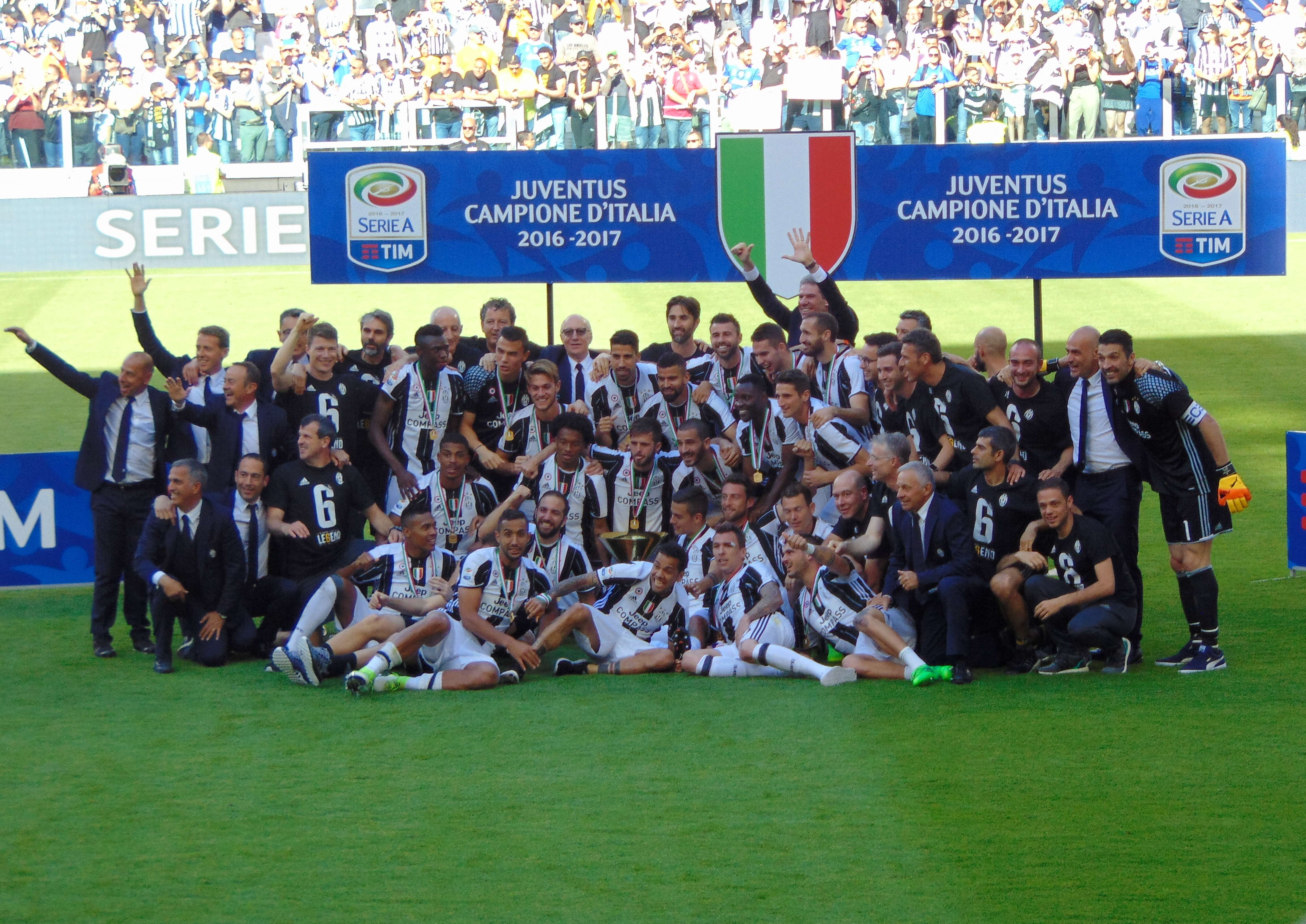 Torino, Juventus Stadium, 21 maggio 2017. Al termine della vittoriosa sfida interna contro il Crotone (3-0), la Juventus festeggia la conquista del 33° scudetto nonché 6° consecutivo — quest'ultimo un record nella storia del campionato italiano di Serie A e dei maggiori campionati nazionali d'Europa.